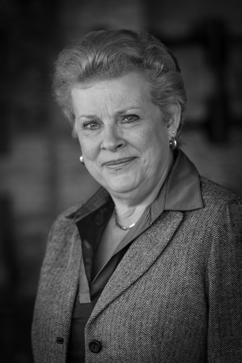 Catherine Trautmann par Claude Truong-Ngoc février 2016